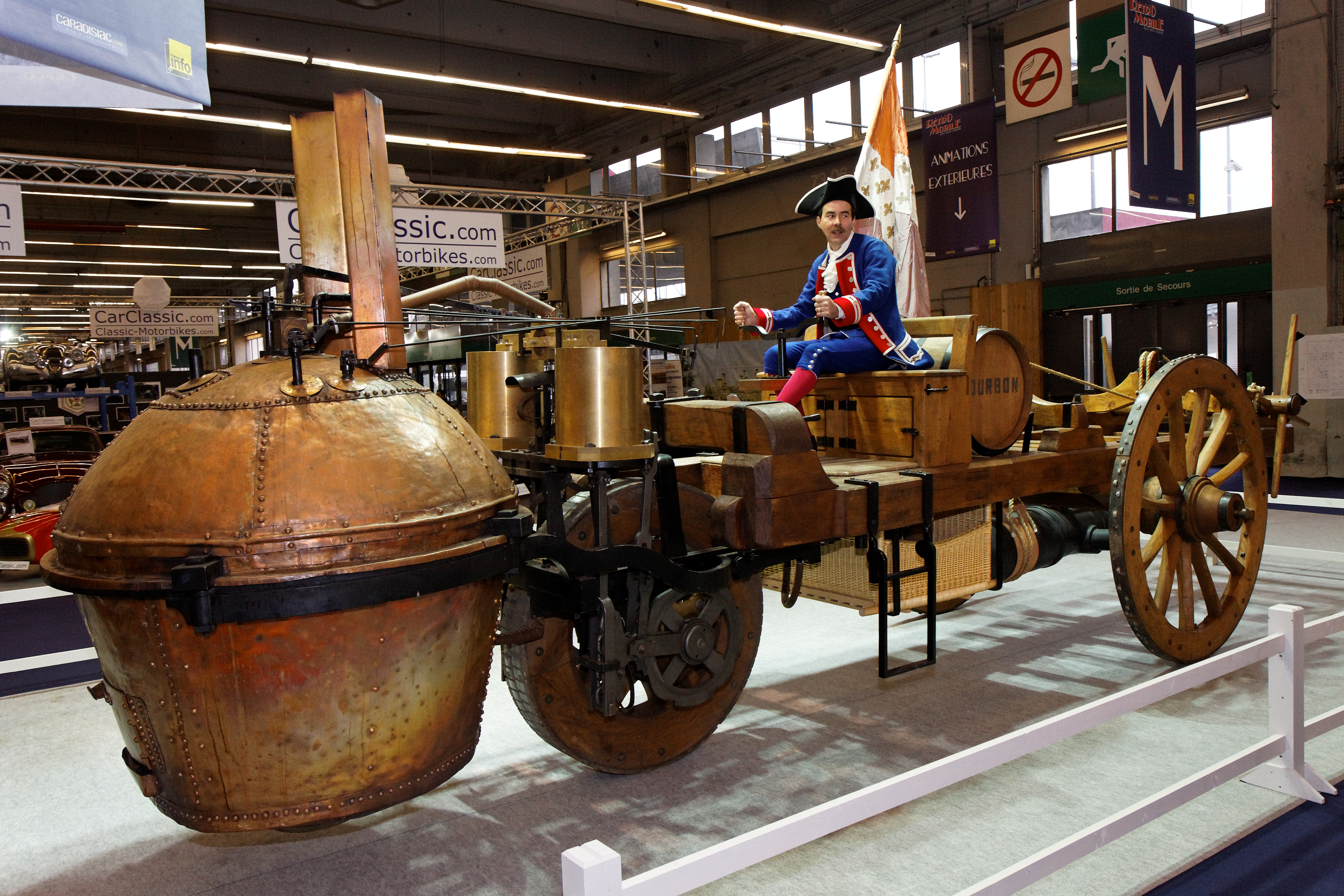 Photographie prise lors du salon rétromobile 2011 à Paris, porte de Versailles.